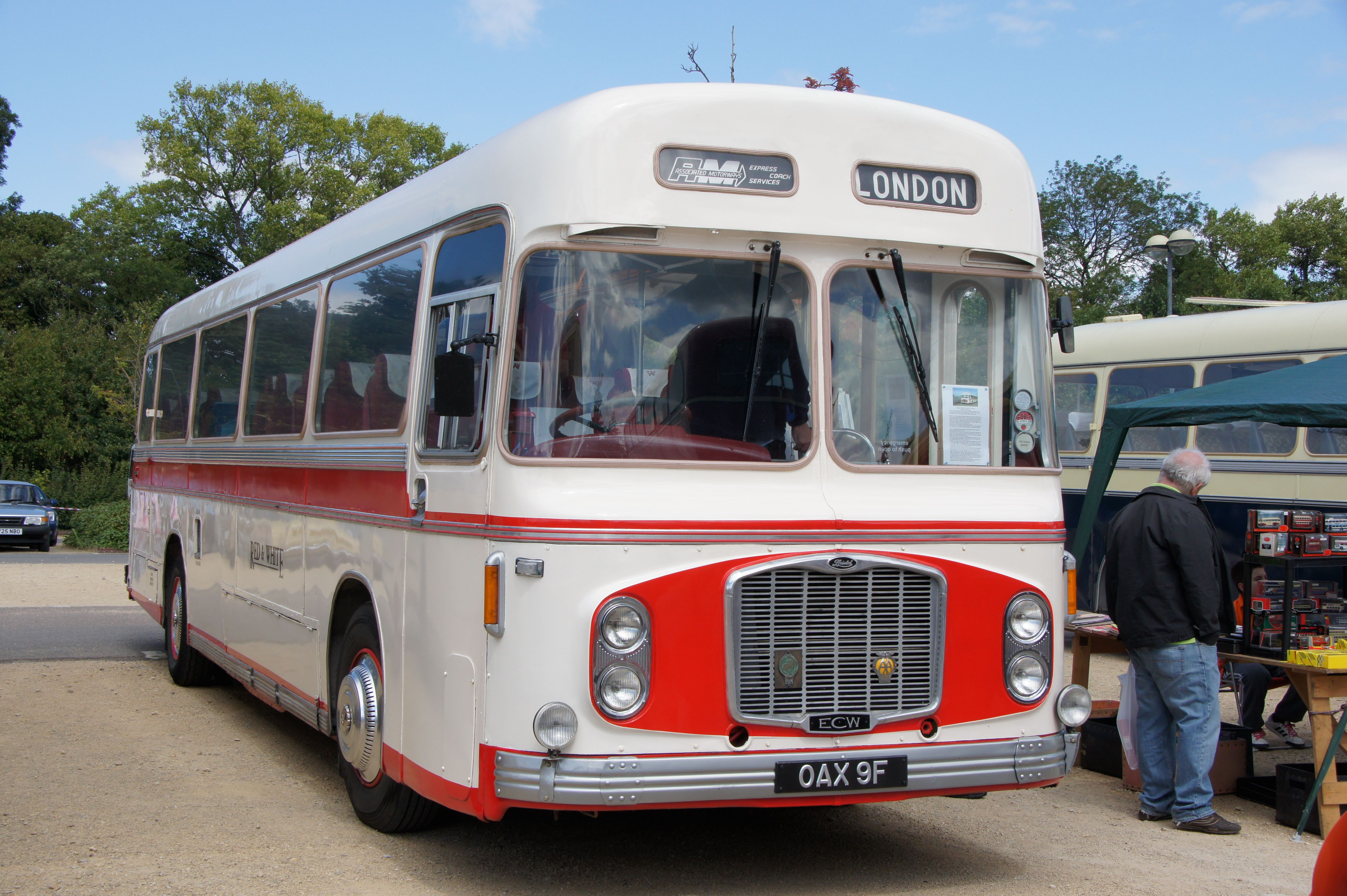 OAX9F-1 140811 CPS